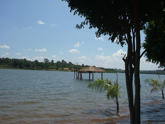 Rio